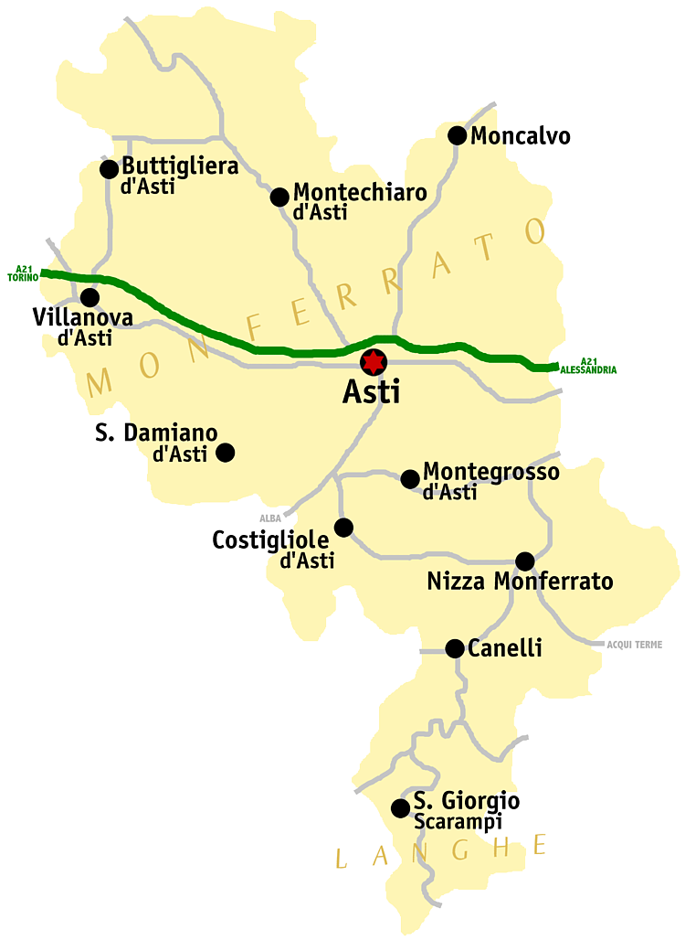 Mappa della provincia di Asti